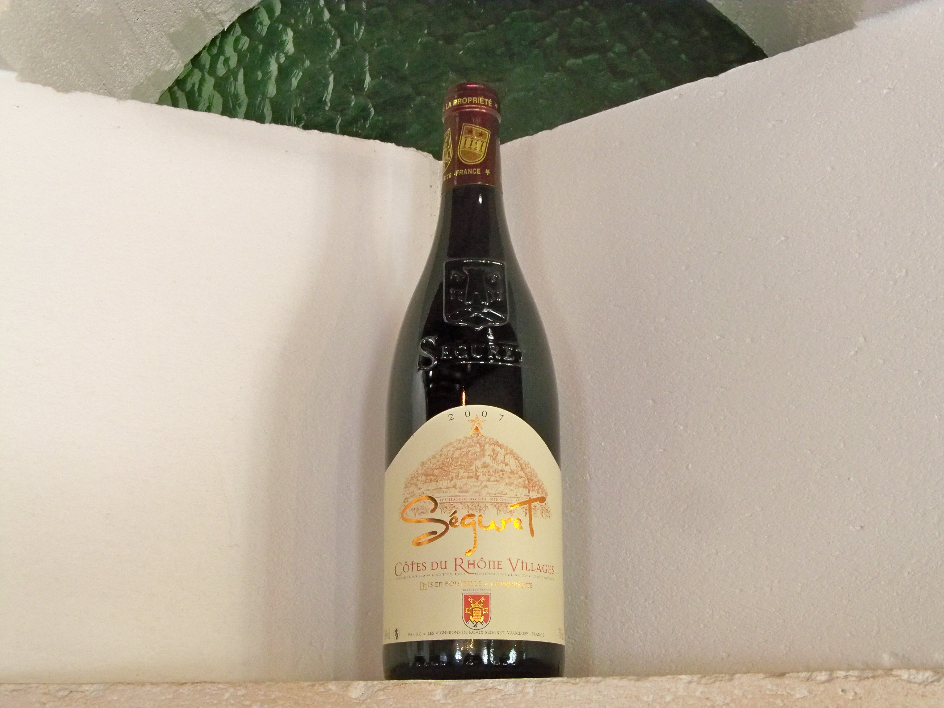 Bouteille de Séguret AOC, Vaucluse